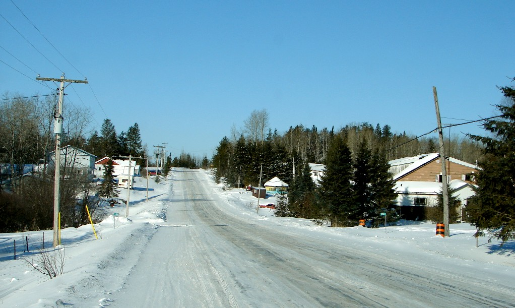 Dane, Ontario, Canada